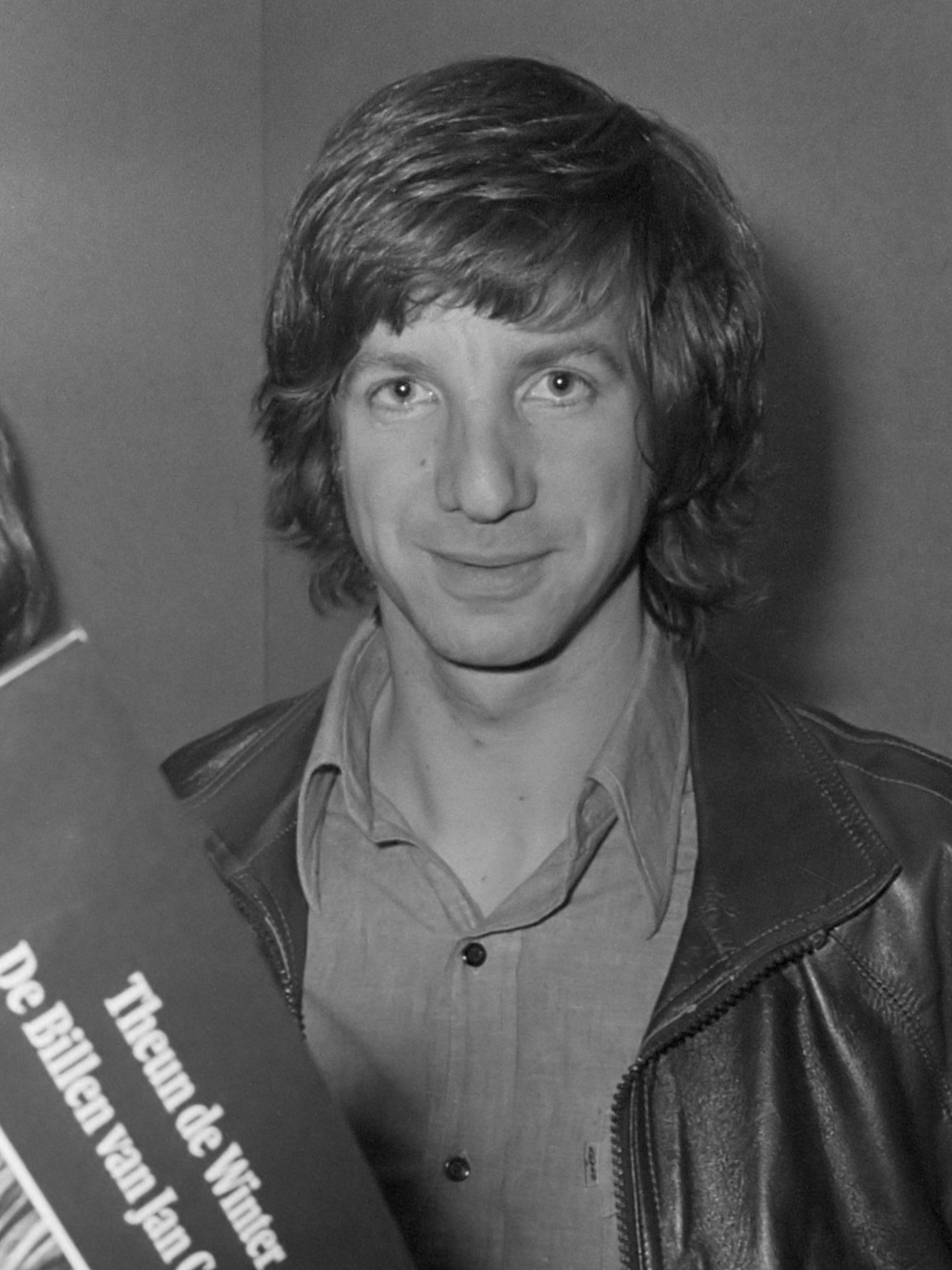 Presentatie boekje "De billen van Jan Cremer" in Amsterdam; v.l.n.r. Jan Cremer, Sonja Barend en Theun de Winter 15 december 1975